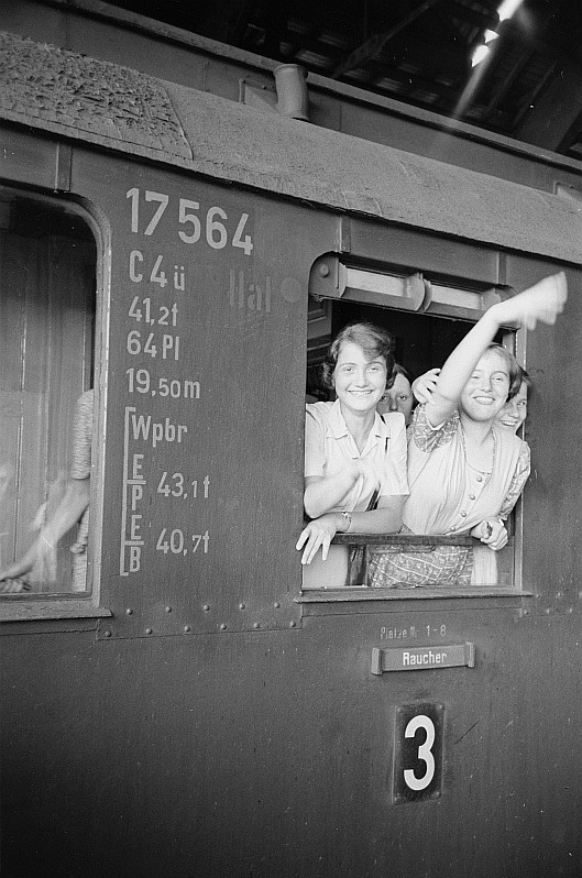 Original image description from the Deutsche Fotothek Ankunft im Berliner Ostabahnhof